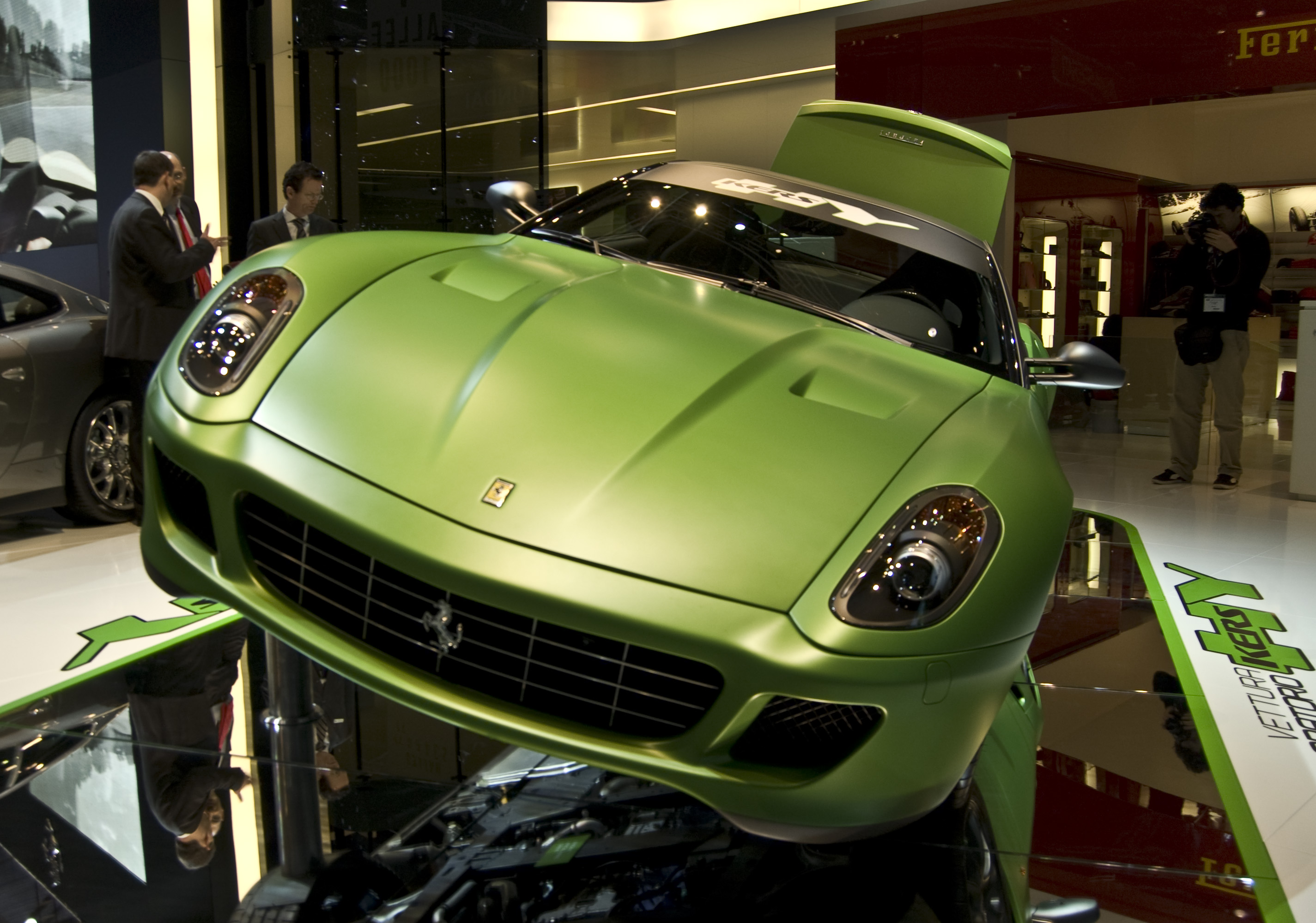 Ferrari 599 HY KERS en el Salón de Ginebra 2010.